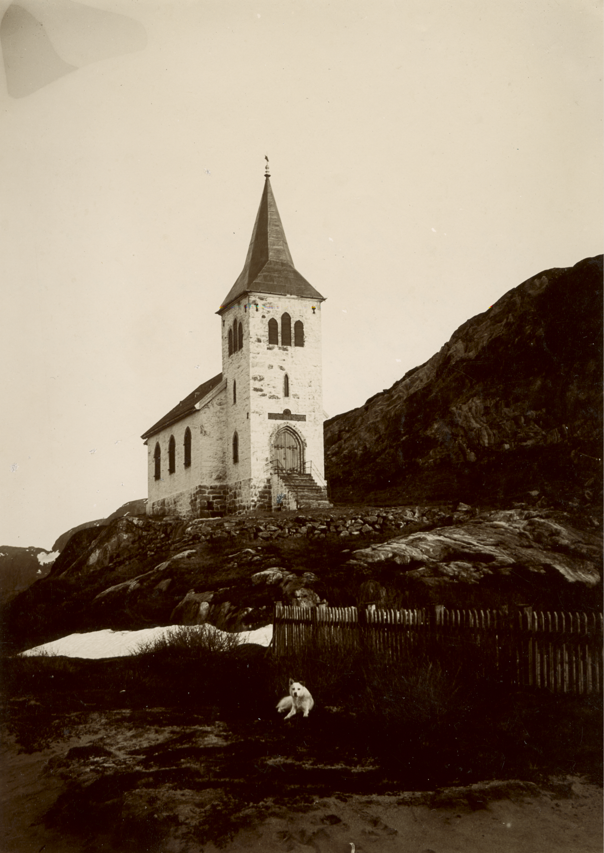 Oscar II kapell i Neiden, Finnmark